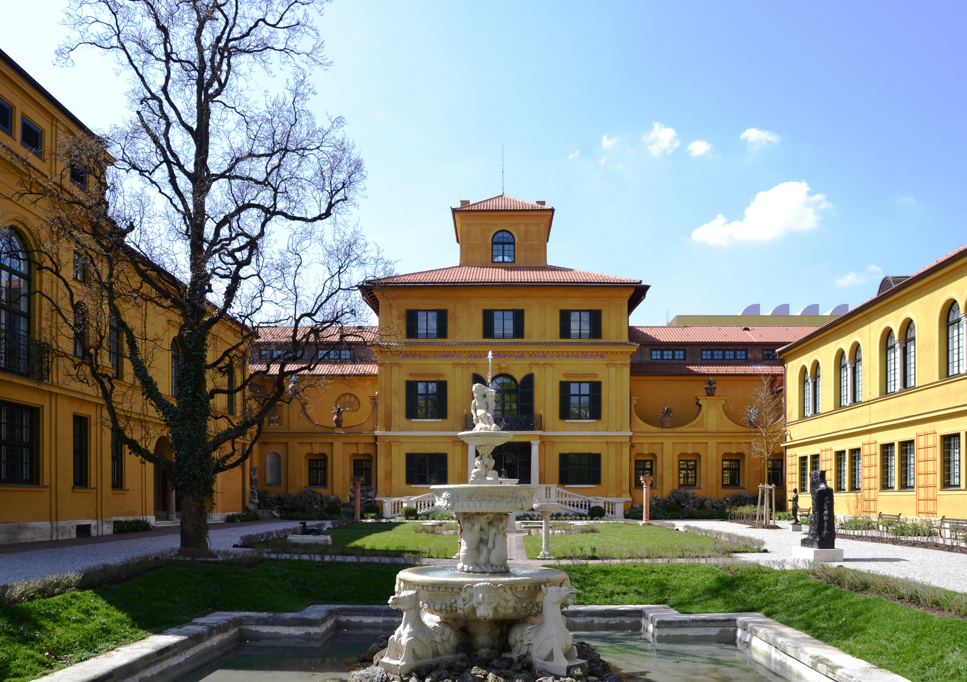 Das Lenbachhaus in München, am Tag der Wiedereröffnung im Jahr 2013.